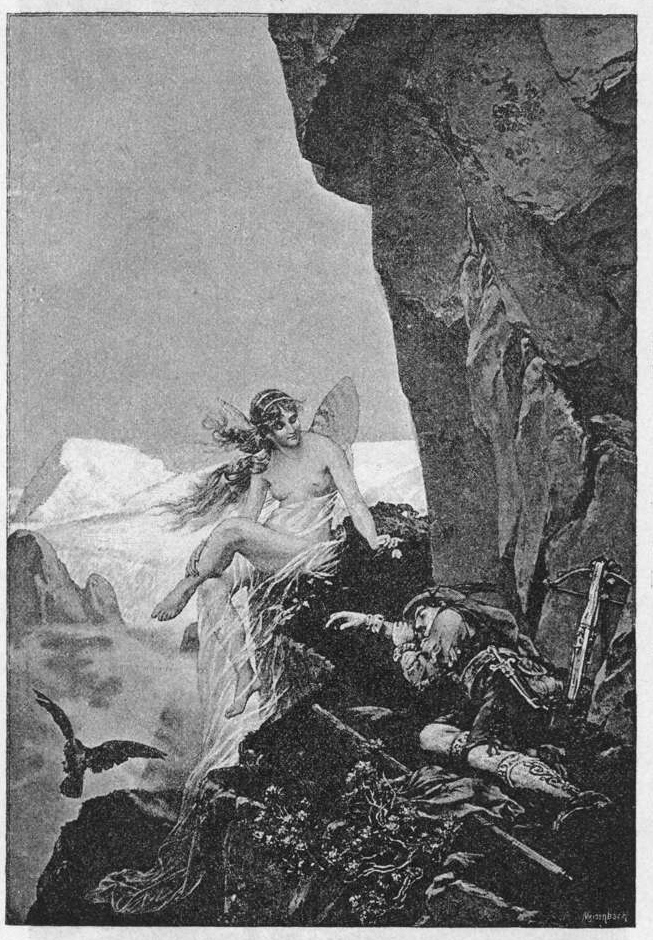 Alpenmärchen